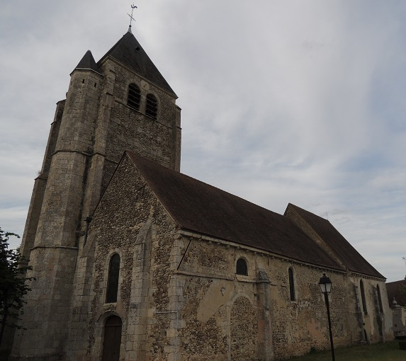 Église Saint-Georges d'Ymeray, facades occidentale avec le clocher flanqué d'une tourelle à meurtrières adossé à la nef côté Nord et facade Sud terminée par le chevet semi octogonal à l'extrème droite